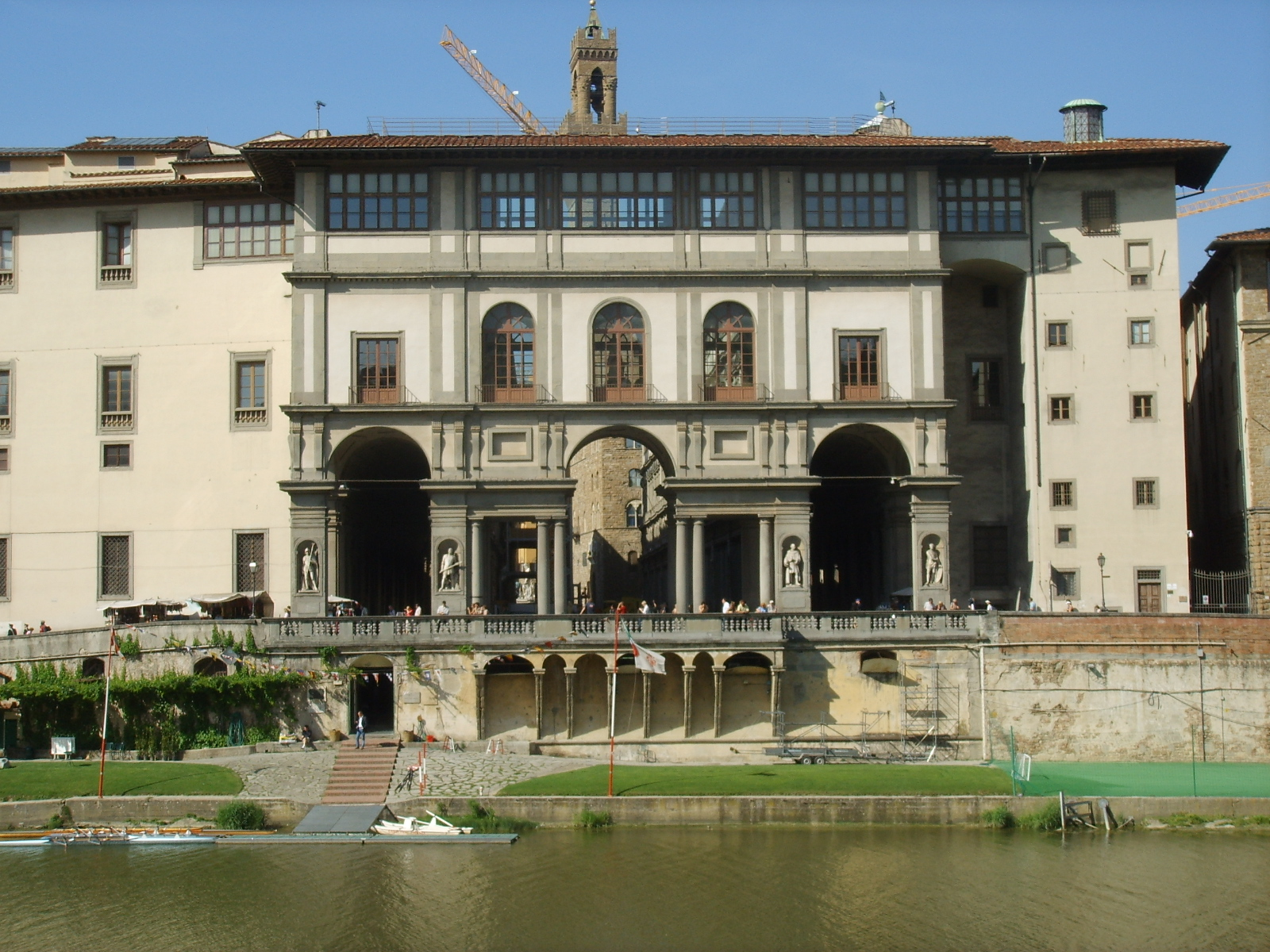 Loggia degli uffizi